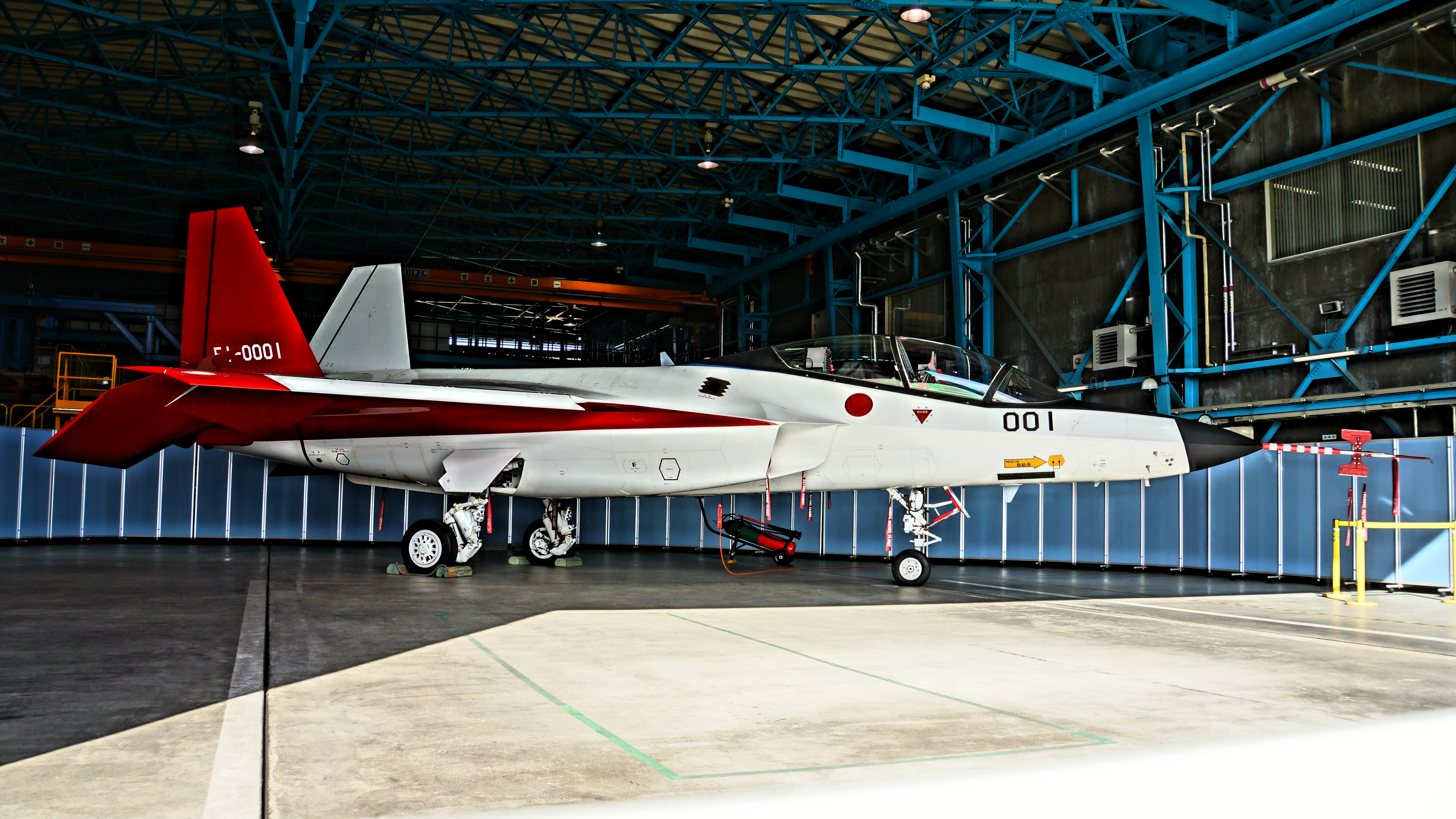 先進技術実証機 X-2 HDR撮影。2016年10月30日 航空自衛隊岐阜基地にて。